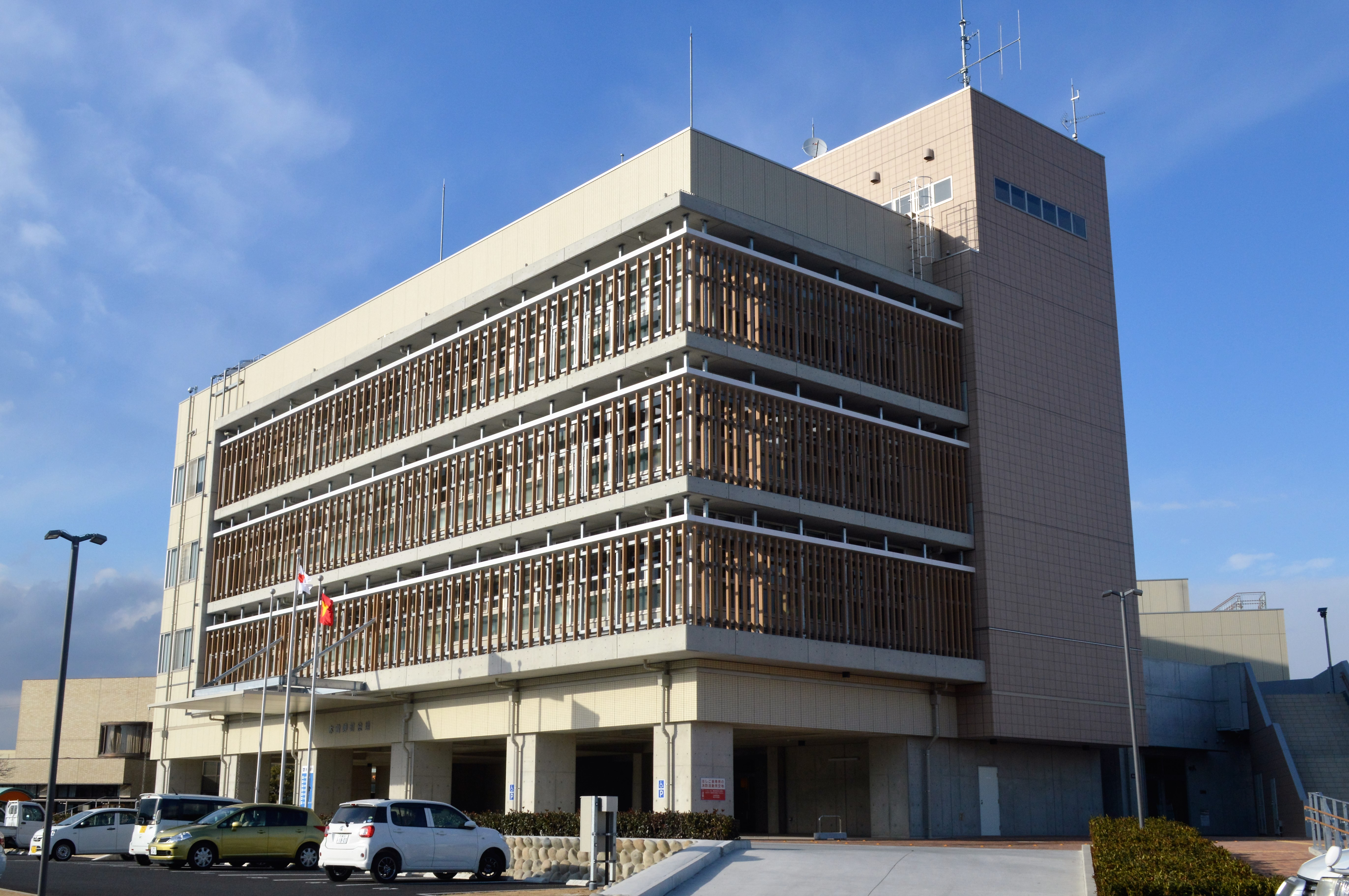 三重県桑名郡の木曽岬町役場。2016年11月に供用開始。